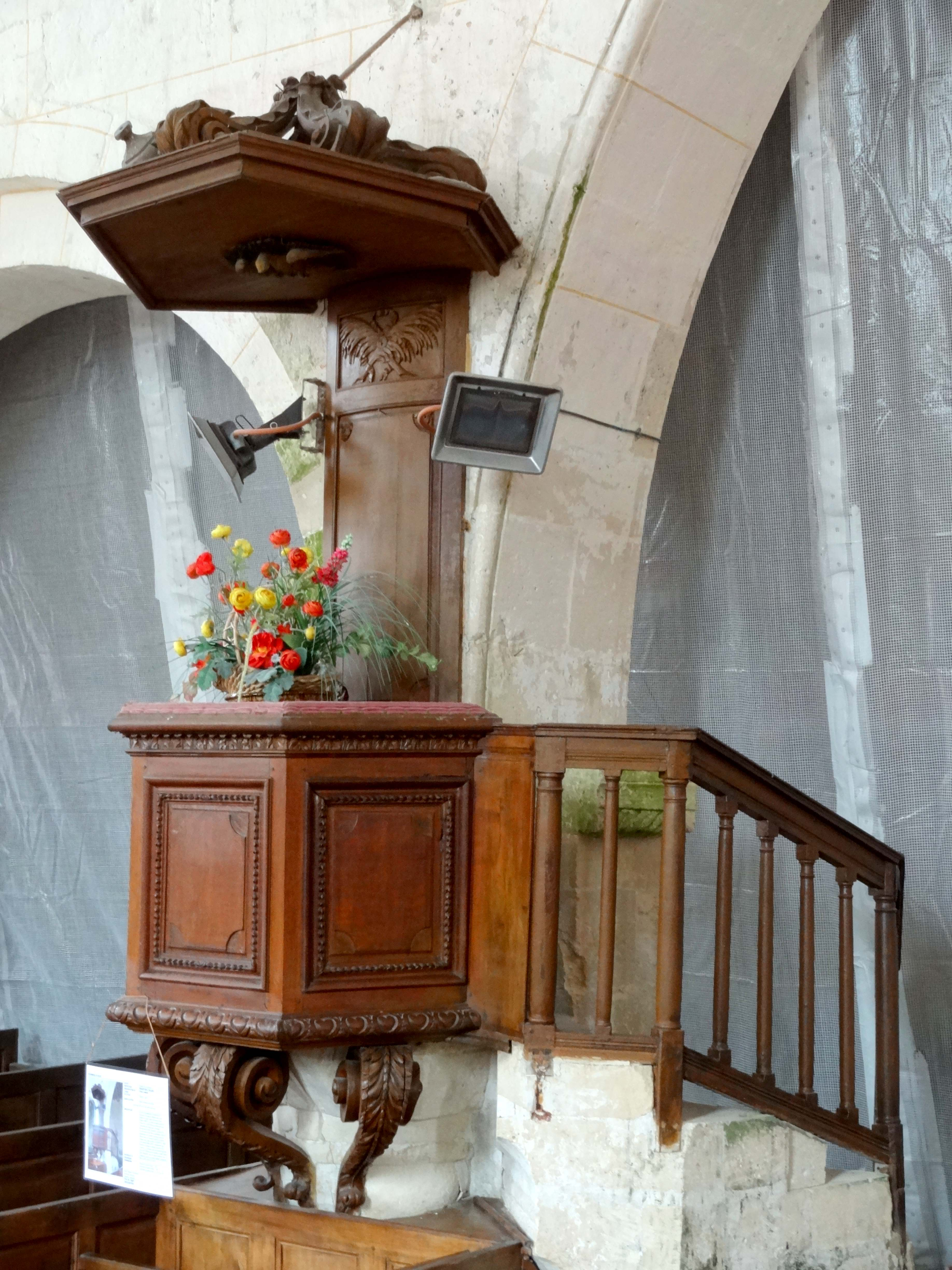 Mobilier de l'église - voir titre.